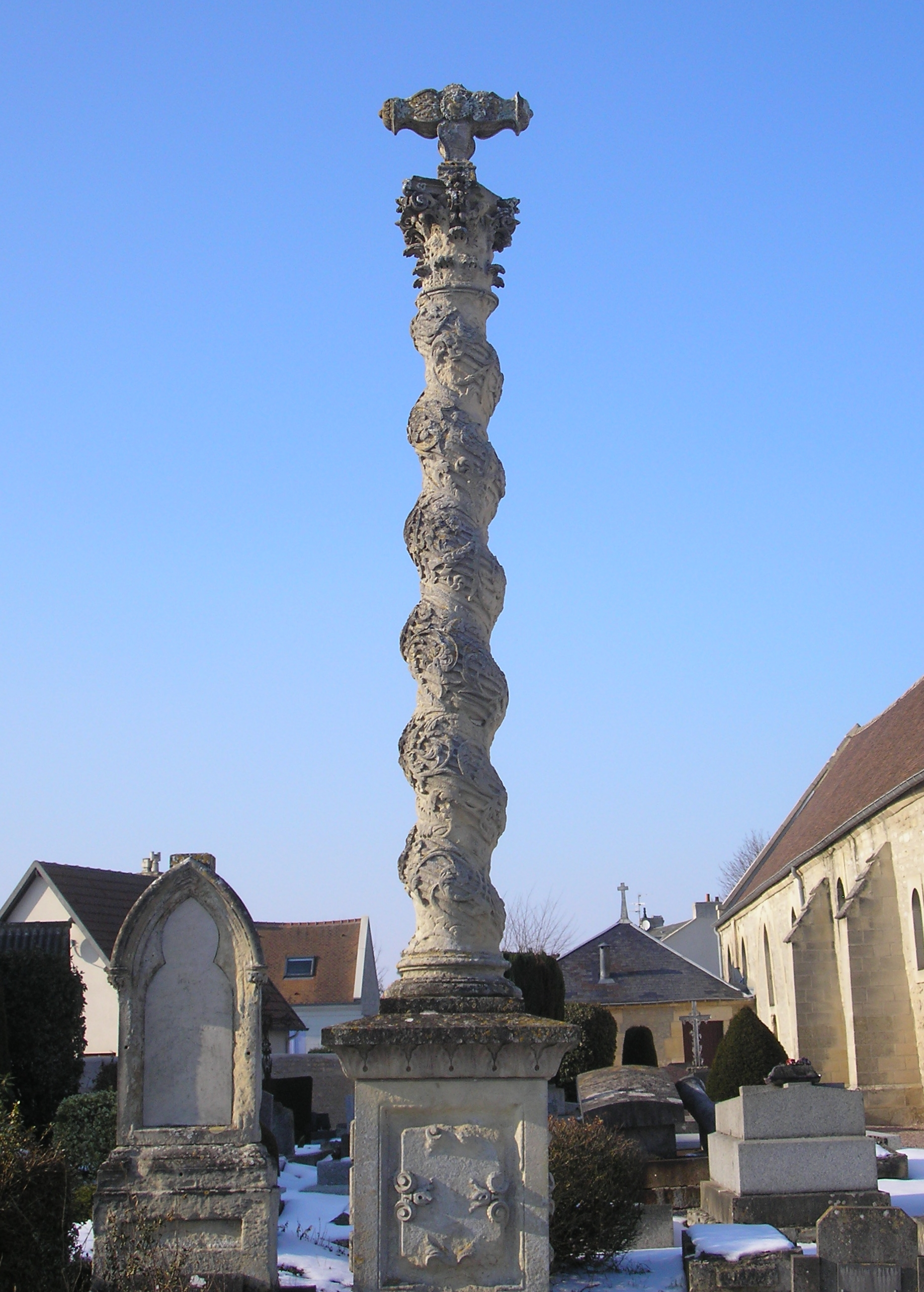 Authie (Normandie, France). La croix du cimetière du XVIIIe siècle.